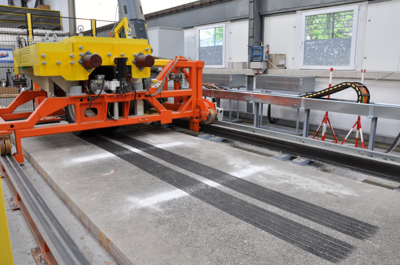 Zariadenie na zrýchlené testovanie vozovky